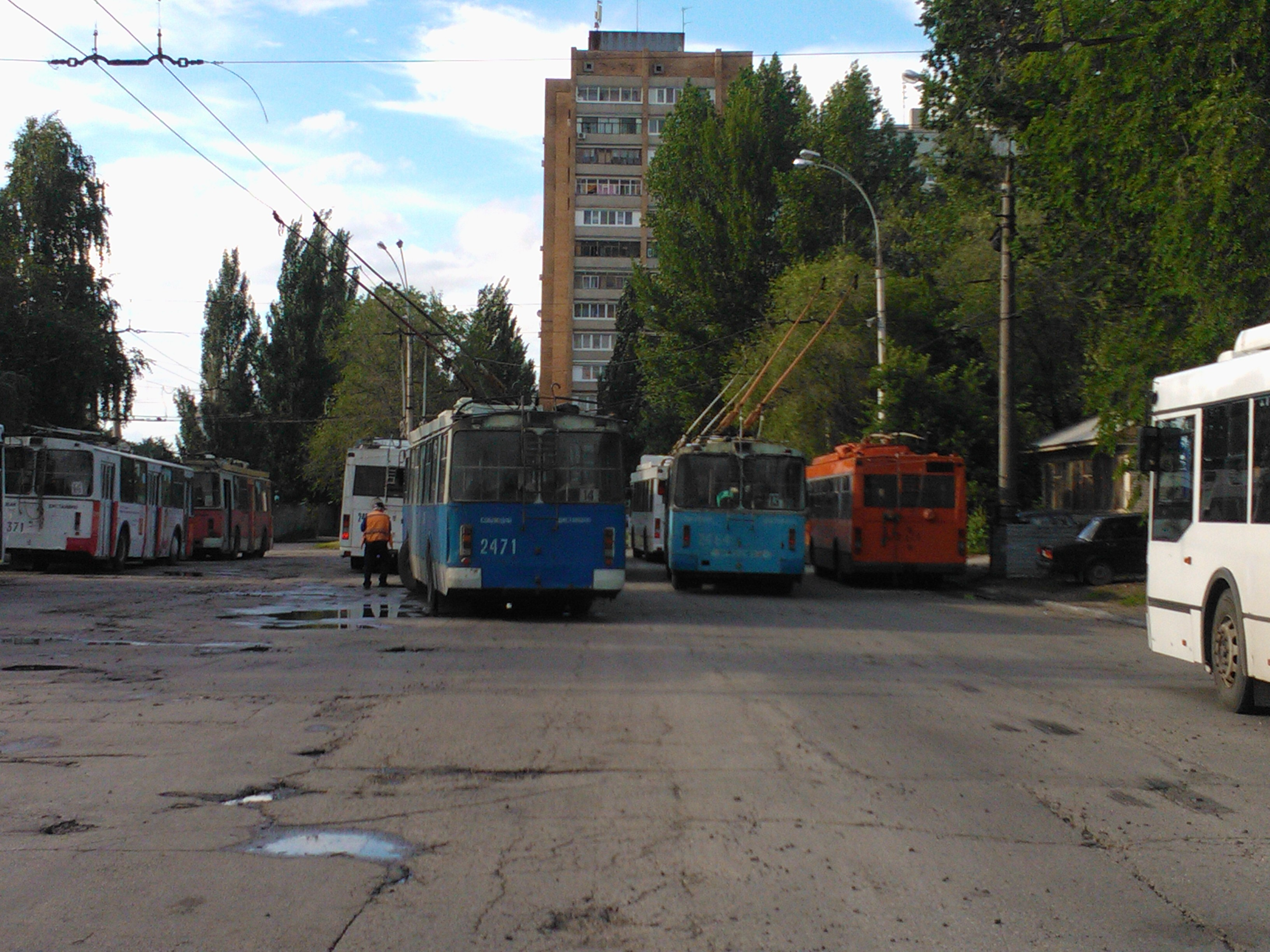 Диспетчерская "7 квартал".